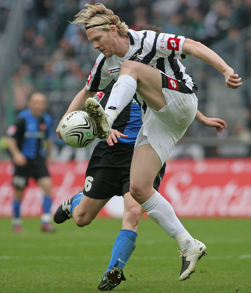 Sascha Rösler, Borussias Nr. 10, beim Heimspiel gegen TuS Koblenz